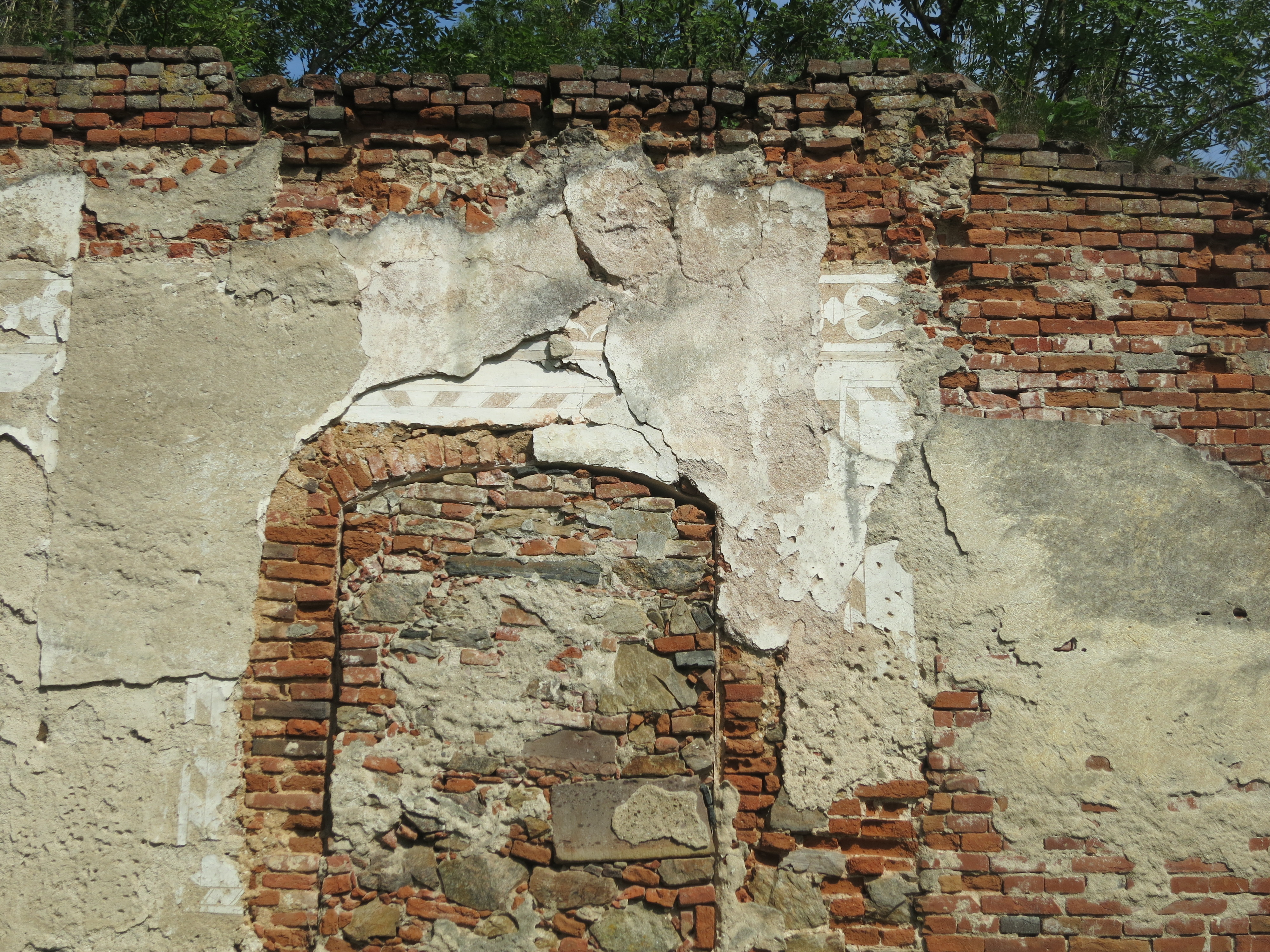 Renesanční sgrafitová výzdoba štítové fasády bývalého zámku v Alinkově